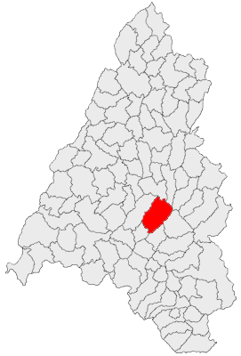 Categorie:Hărţi ale judeţului Bihor